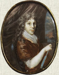 Пелагея Николаевна Толстая (урожденная Горчакова, 1762-1838) - жена И.А. Толстого. Бабушка Льва Толстого Род князей Горчаковых, восходящий к Рюрику, прославился в XVIII и особенно в XIX веке военачальниками, из которых один, троюродный брат Пелагеи Николаевны Алексей Иванович Горчаков, был военным министром, а другой - Андрей Иванович - боевым генералом. Пелагея Николаевна - дочь кн. Николая Ивановича Горчакова - «была недалекая, малообразованная - она, как все тогда, знала по-французски лучше, чем по-русски (и этим ограничивалось ее образование), и очень избалованная - сначала отцом, потом мужем, а потом... сыном - женщина. Кроме того, как дочь старшего в роде, она пользовалась большим уважением всех Горчаковых...» (Толстой Л.Н. т. 34, с. 359).